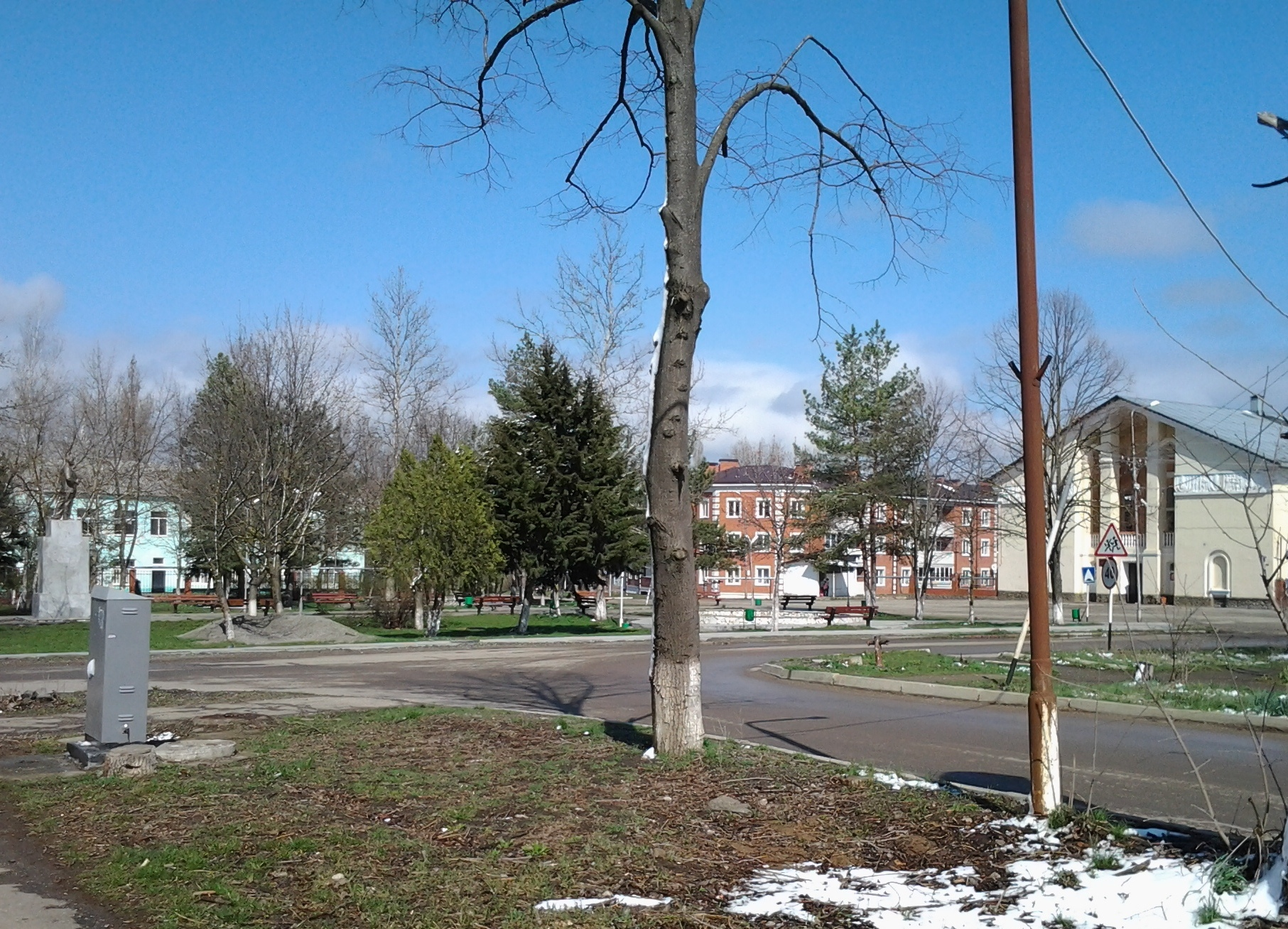 вид на Дом Культуры и парка поселка Черноморского